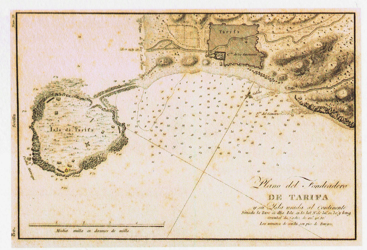 Esta imagen del fondeadero de Tarifa forma parte de la colección de mapas realizada para el Portulano de las Costas de la Península de España, Islas Adyacentes y parte de la costa Africana… Cádiz 1813. Obra promovida por la Dirección de Trabajos Hidrográficos institución dependiente de la Dirección General de la Armada. Esta obra pretendía abarcar la totalidad de las costas españolas, pero finalmente quedó formada por 4 cuadernos. El mapa de Tarifa se integra en el Cuaderno 3º de los reinos de Granada y Sevilla, integrado por 24 planos de las costas andaluzas. El original se encuentra en el Observatorio de la Armada de San Fernando.